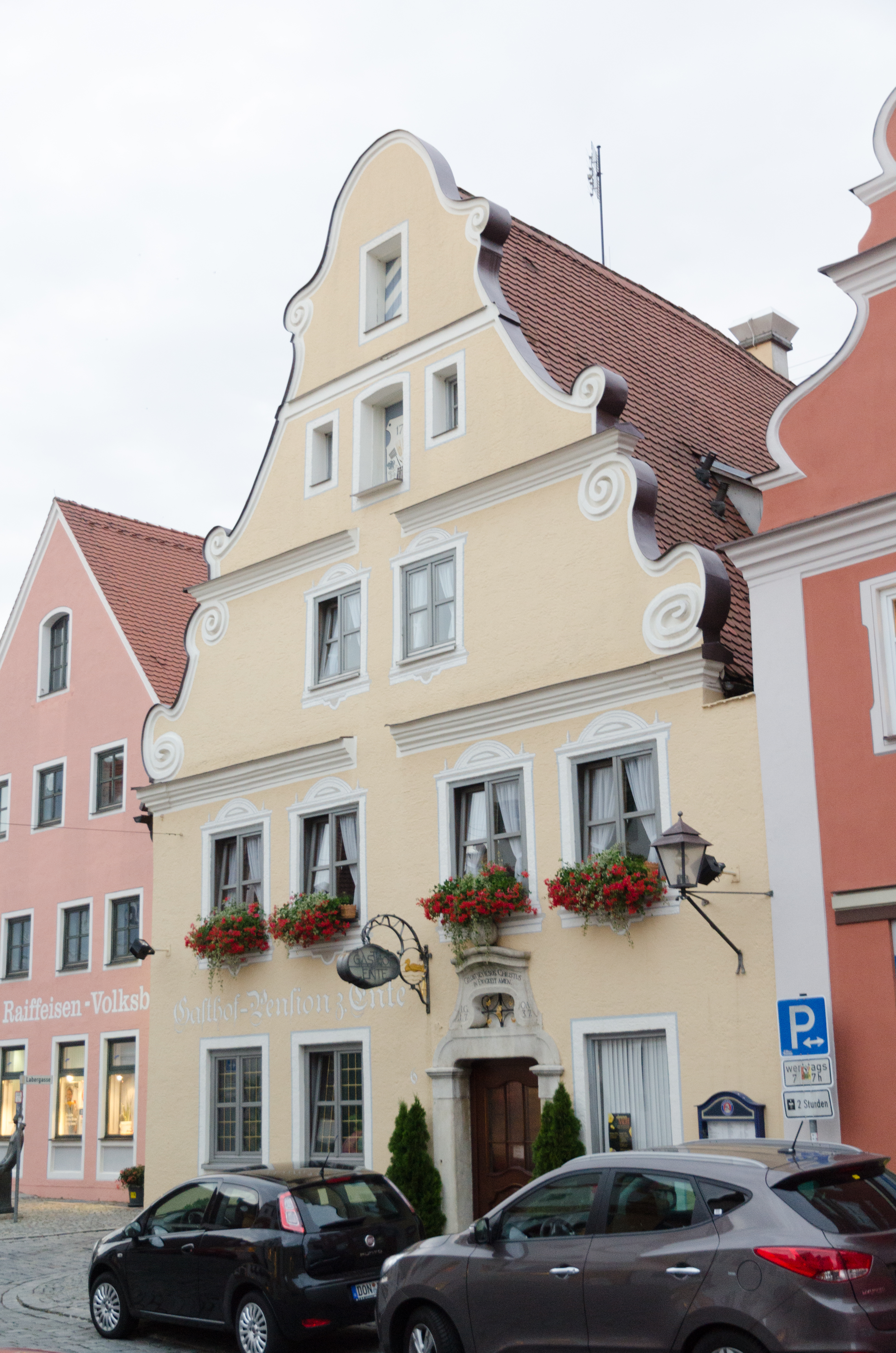 Wemding, Wallfahrtsstraße 6